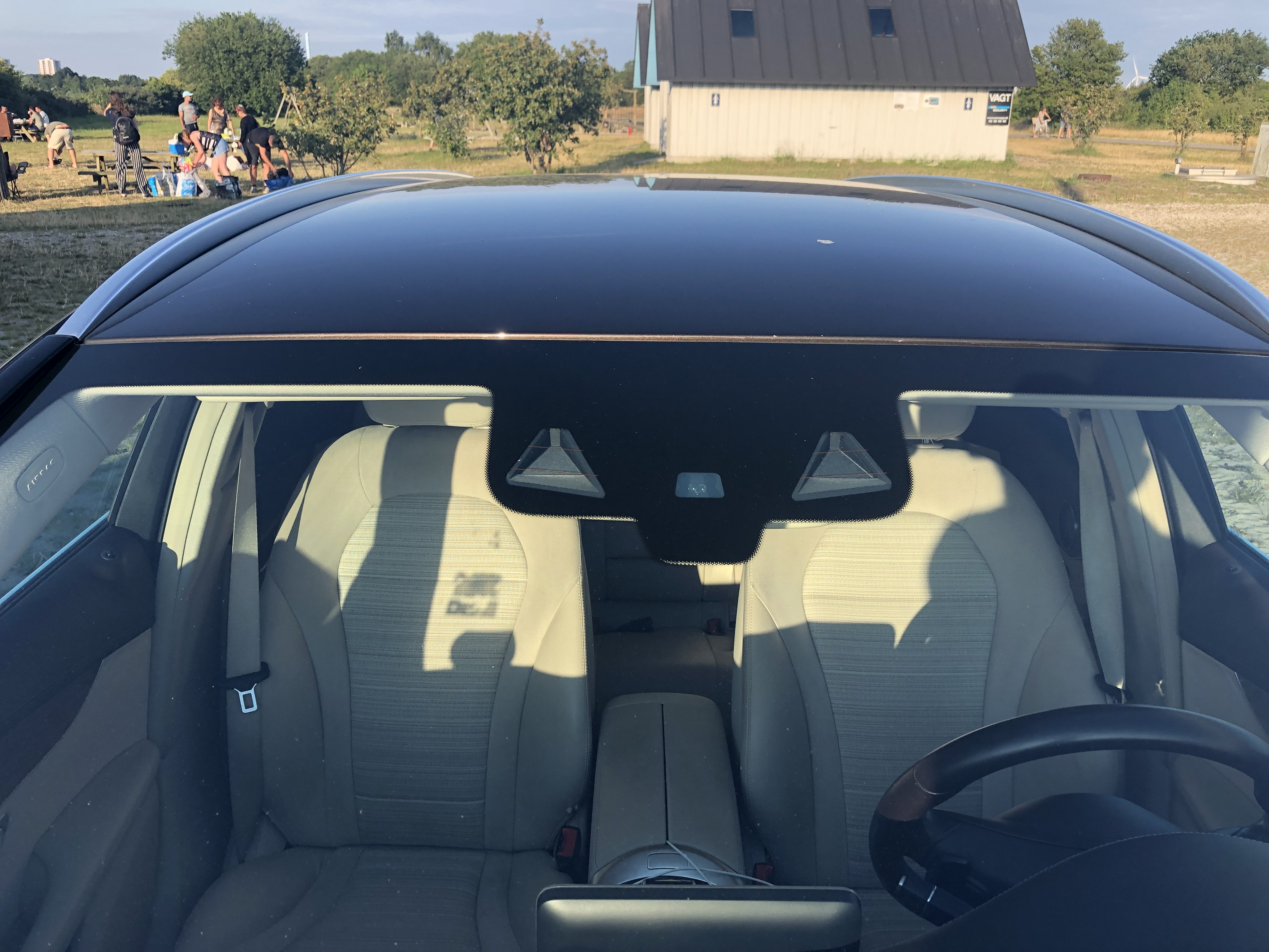 stereo camera supporting the cars head unit in self-driving